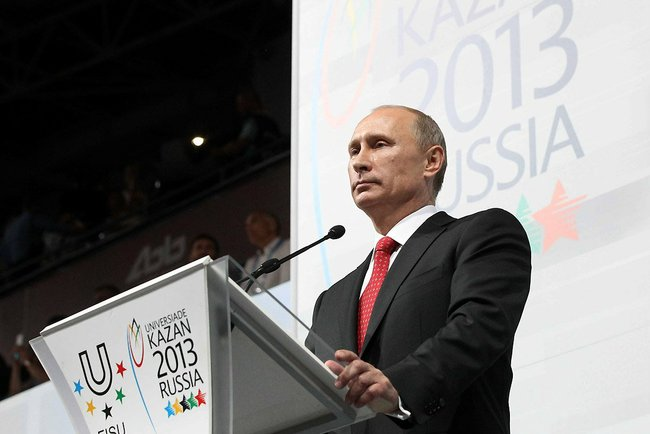 Выступление на церемонии открытия Всемирной летней Универсиады в Казани.